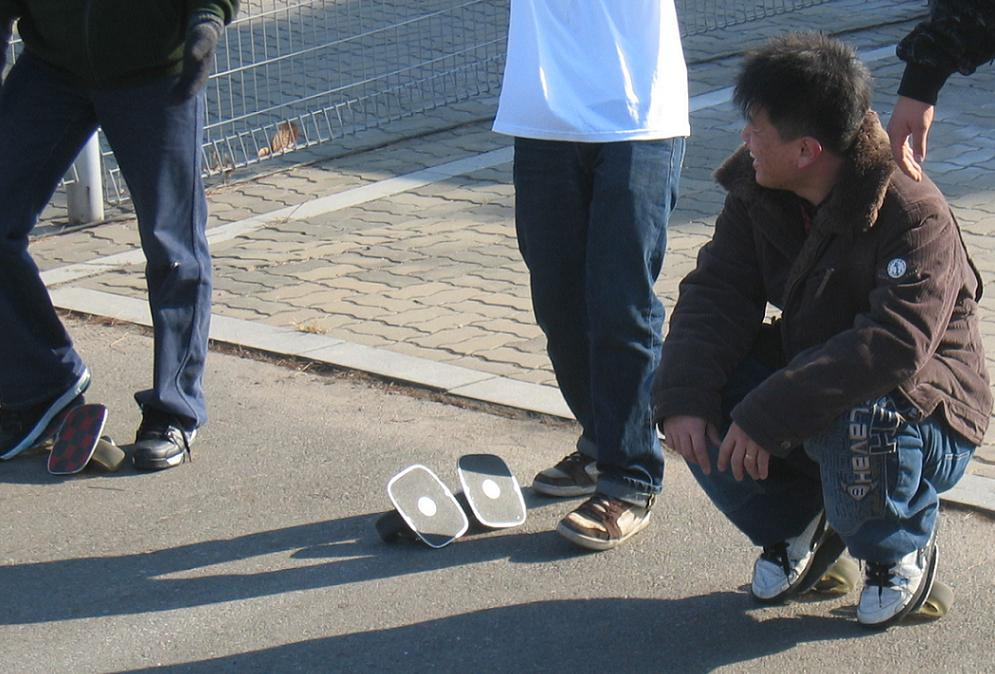 Freeline Skaters in Seoul